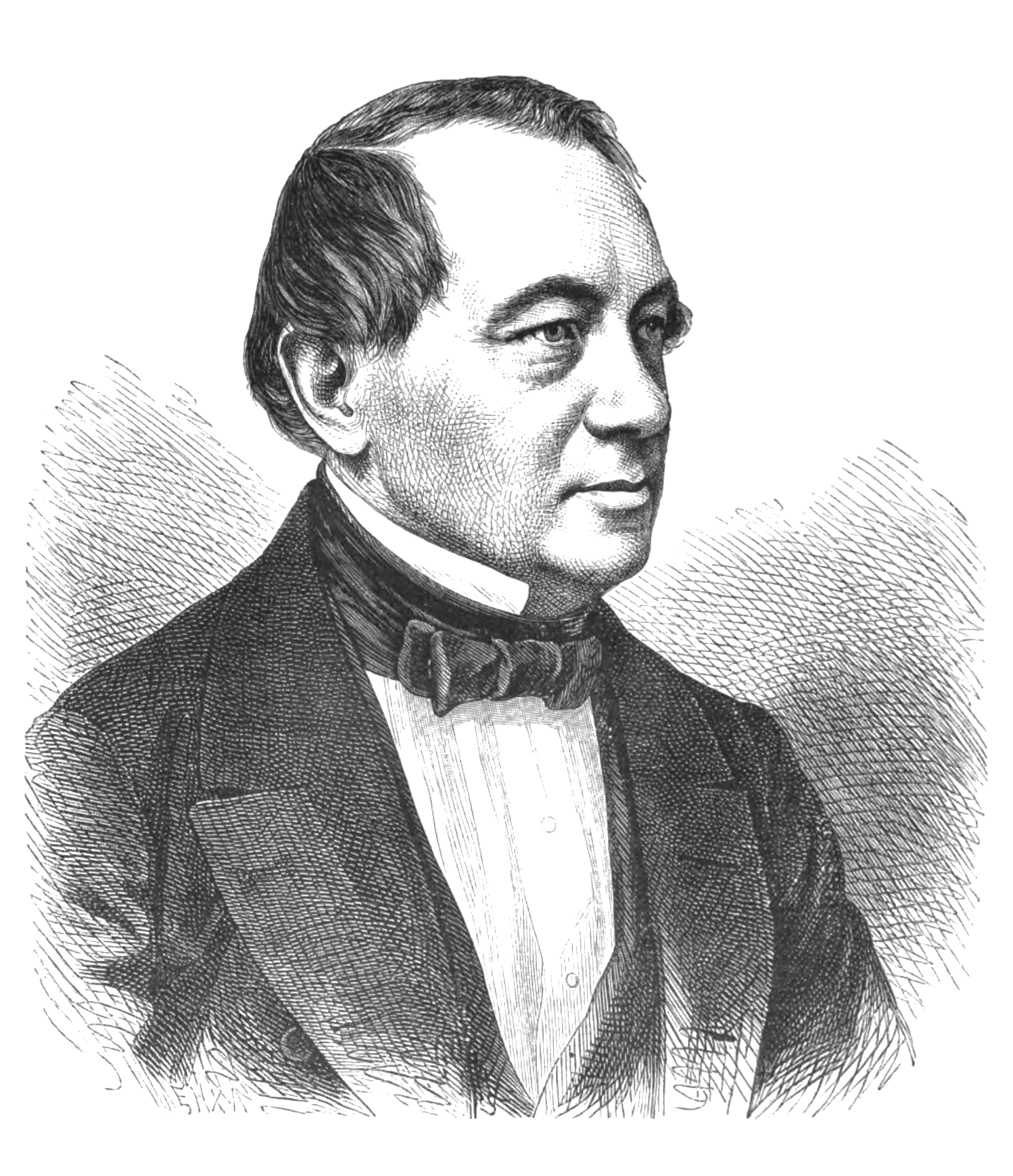 Gustav von Struensee (pseudonym: Gustav vom See; 1803–1875), German writer